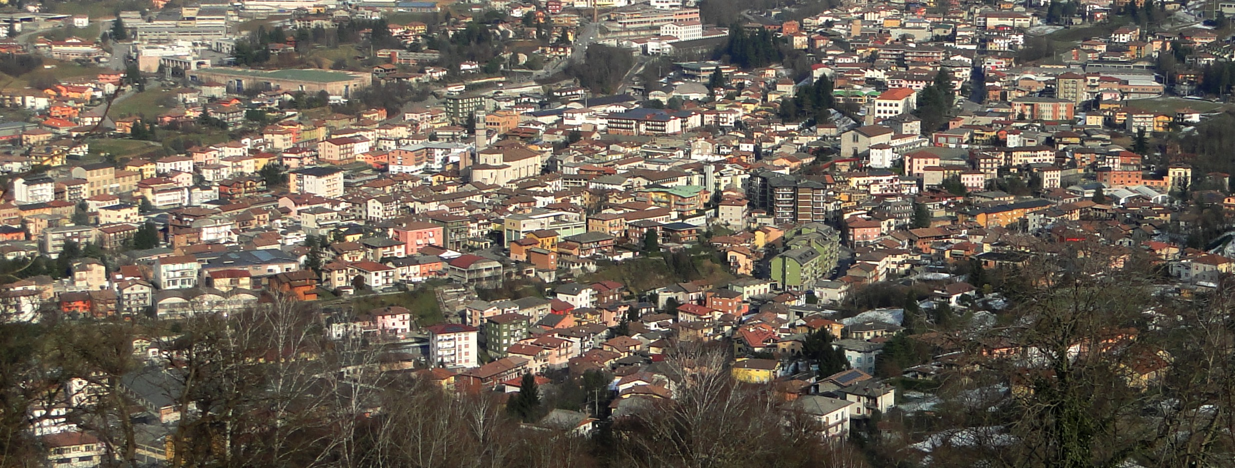 Centro abitato di Leffe (BG), visto dal monte Beio